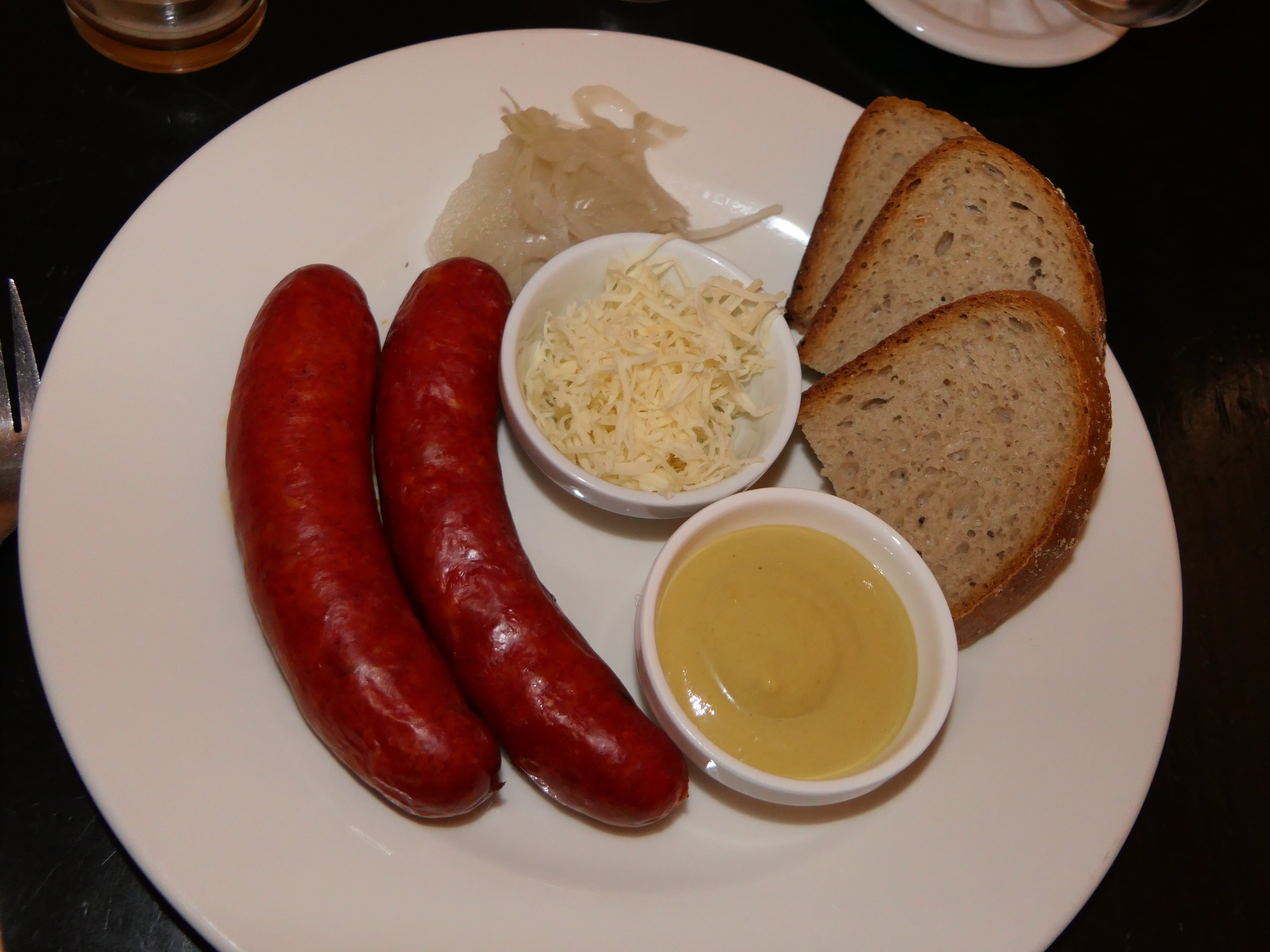 Ungarische Bratwurst mit Senf und Rettich